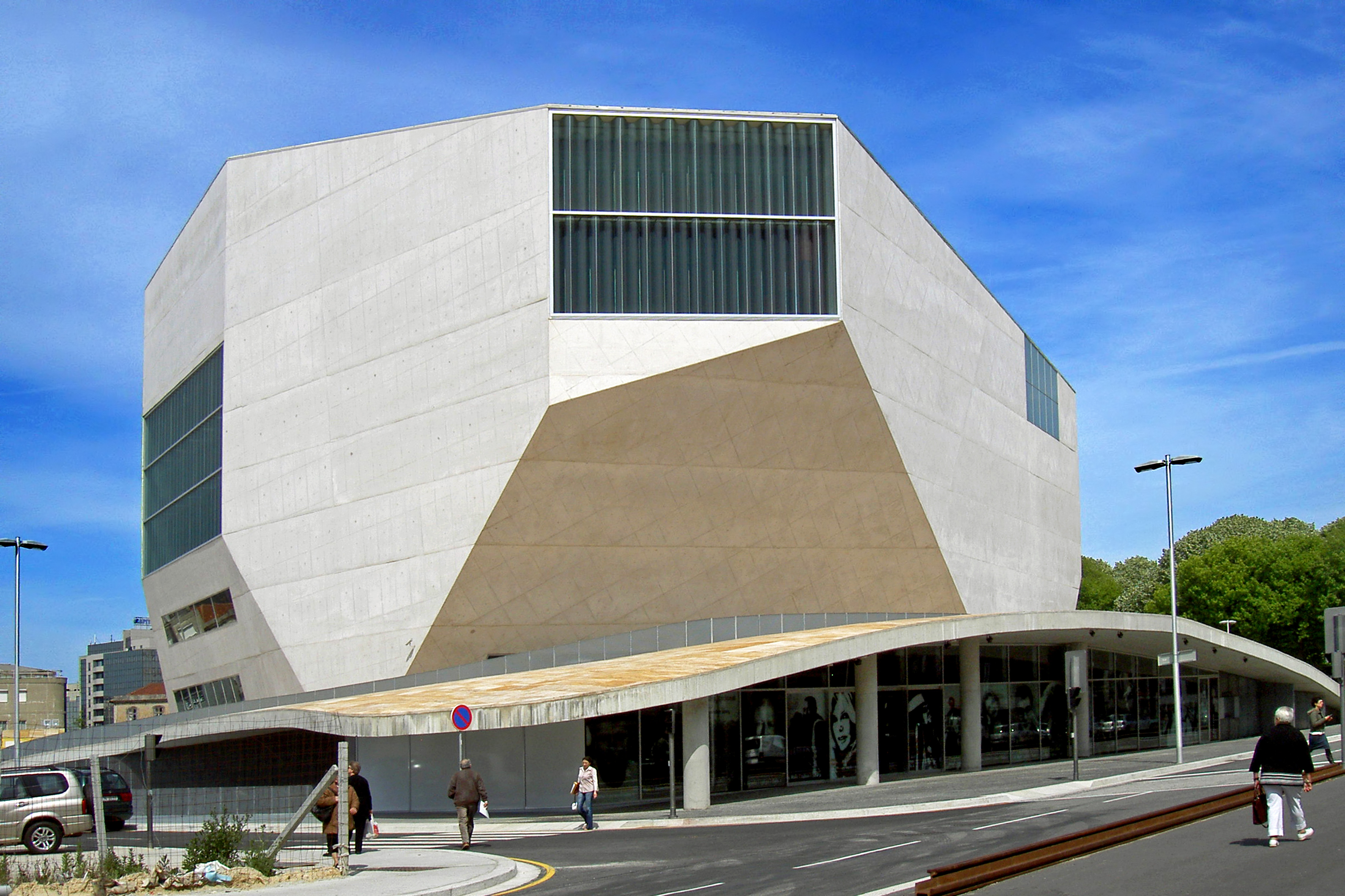 Casa da Música, Porto This file was uploaded for Wiki Loves Monuments in Portugal with the unique identifier 5894463.